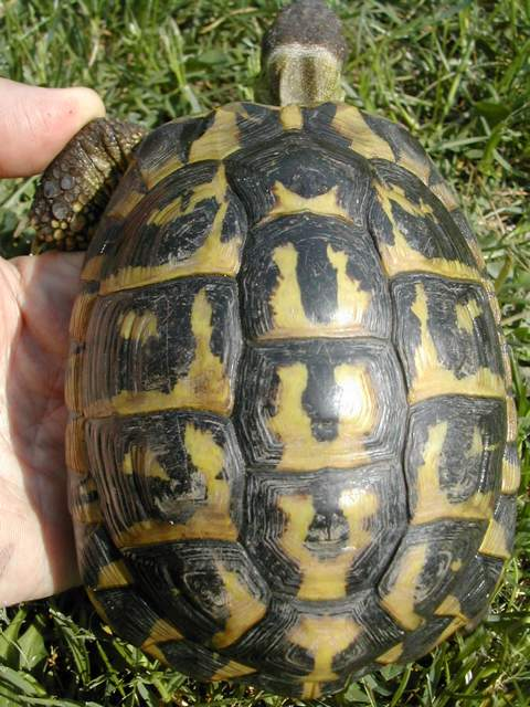 Testudo hermanni hermanni varietà Varoises